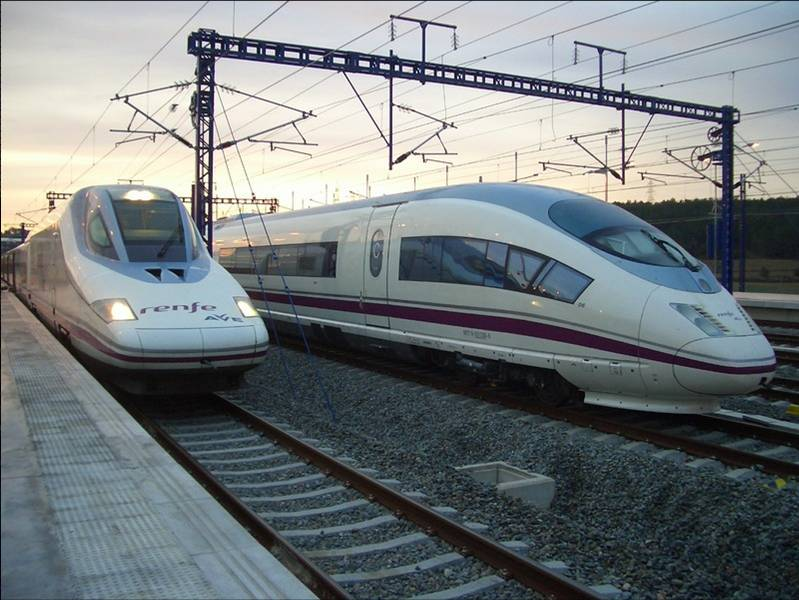 Imagen del Tren Guerrero